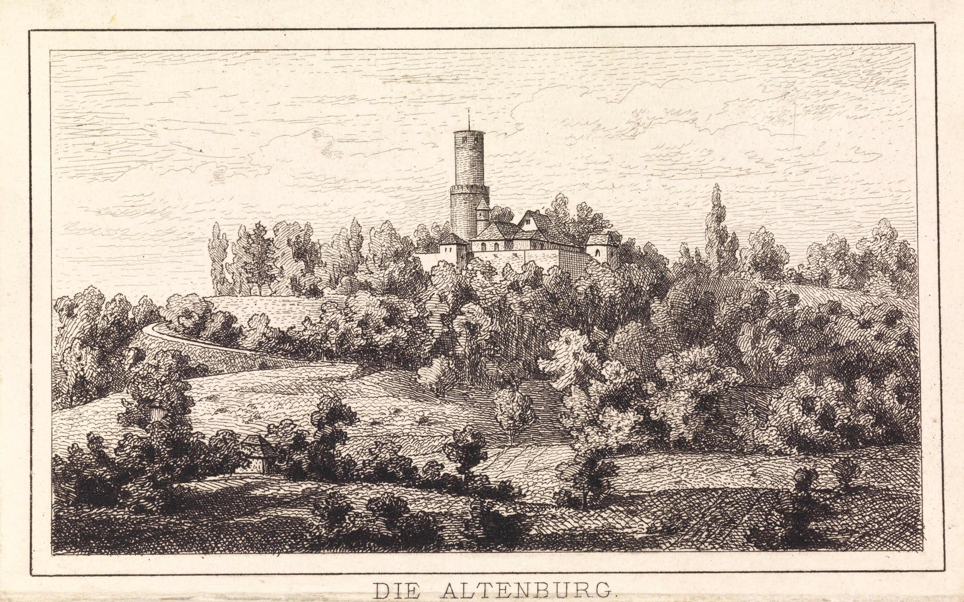 Die Altenburg aus Erinnerung an Bamberg. Stich und Druck von Franz Schemm Kunstanstalt Nürnberg. Verlag von Karl Hübscher's Buch- und Kunsthandlung in Bamberg. [ca. 1880].